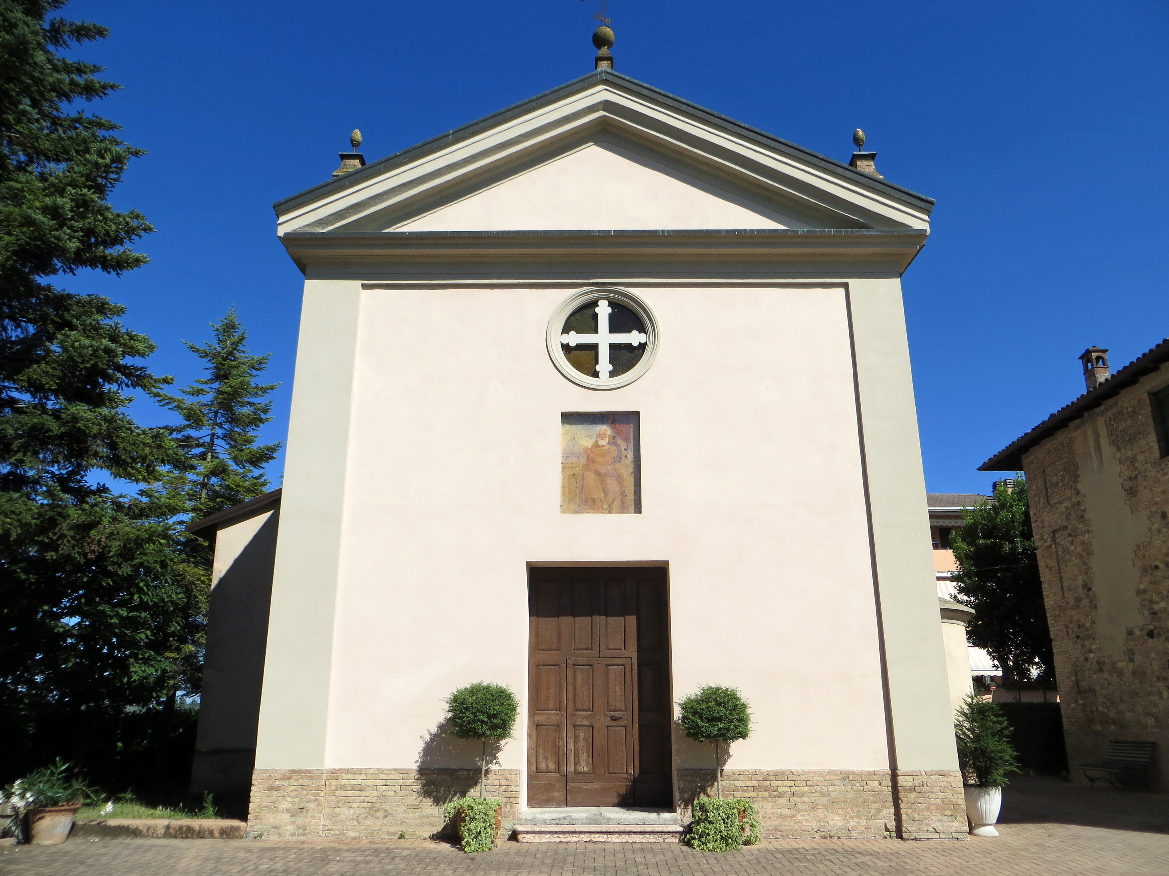 Chiesa di San Pietro Apostolo (Roncopascolo, Parma) - facciata